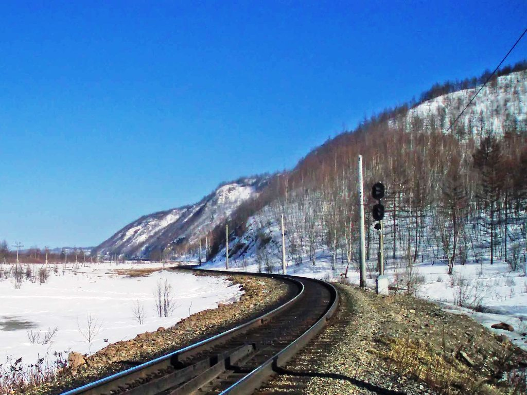 Железная дорога Комсомольск-на-Амуре - Совгавань